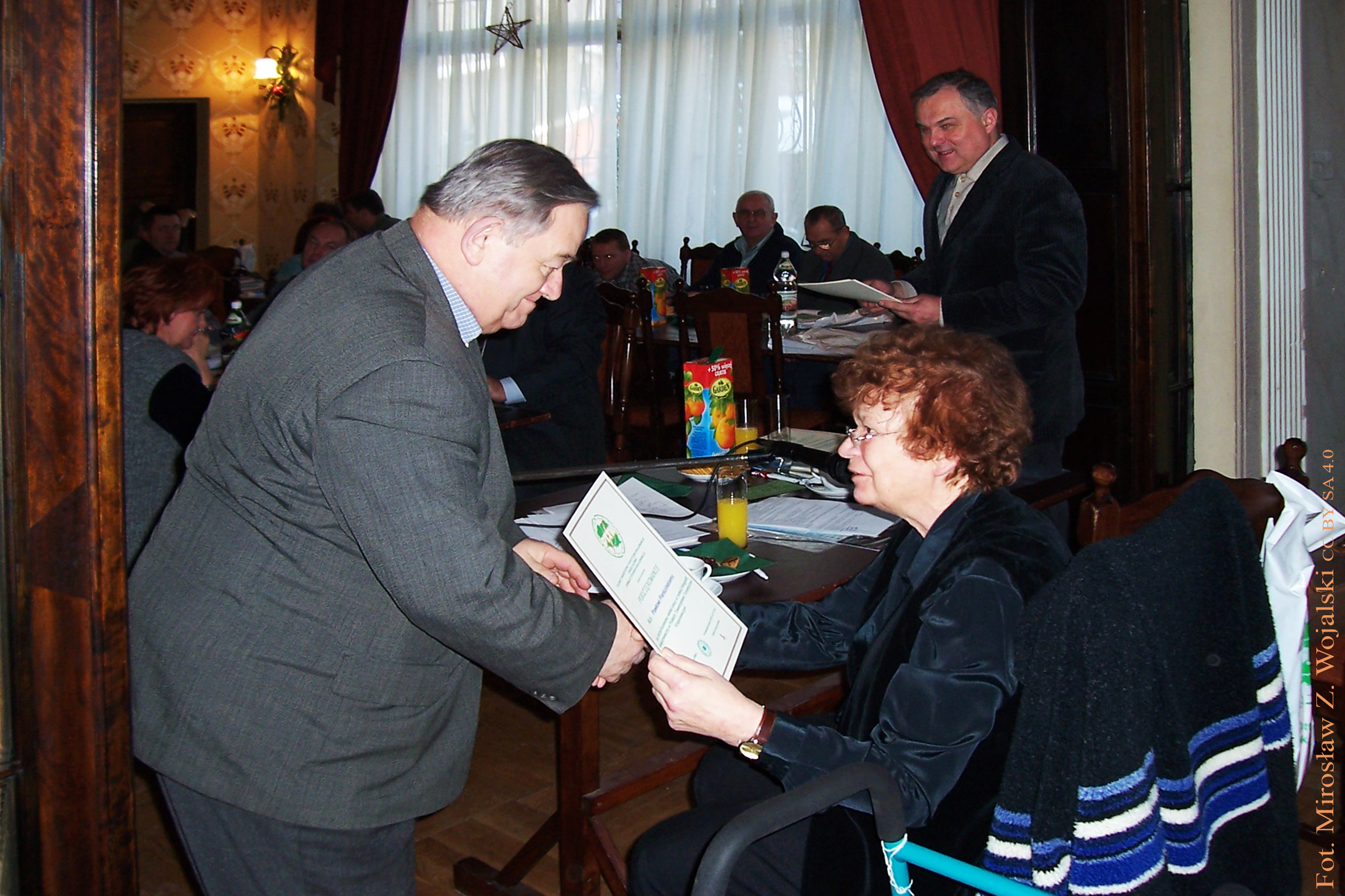 Paweł Pierściński i Zofia Lubczyńska w głębi Andrzej Danowski działacze fotografii krajoznawczej PTTK w Łodzi w Centrum Fotografii Krajoznawczej PTTK 2004-02-07